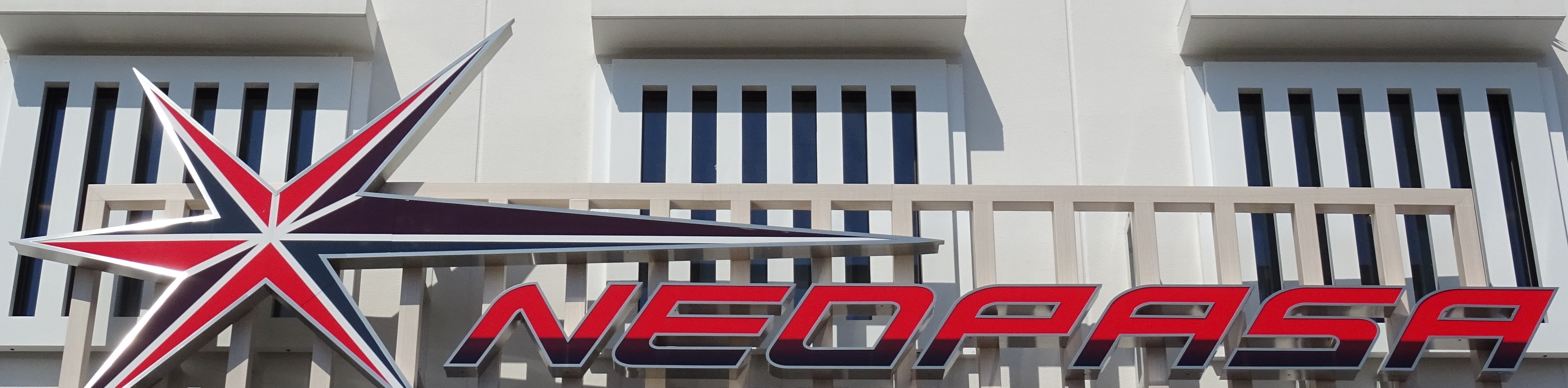 NEOPASA